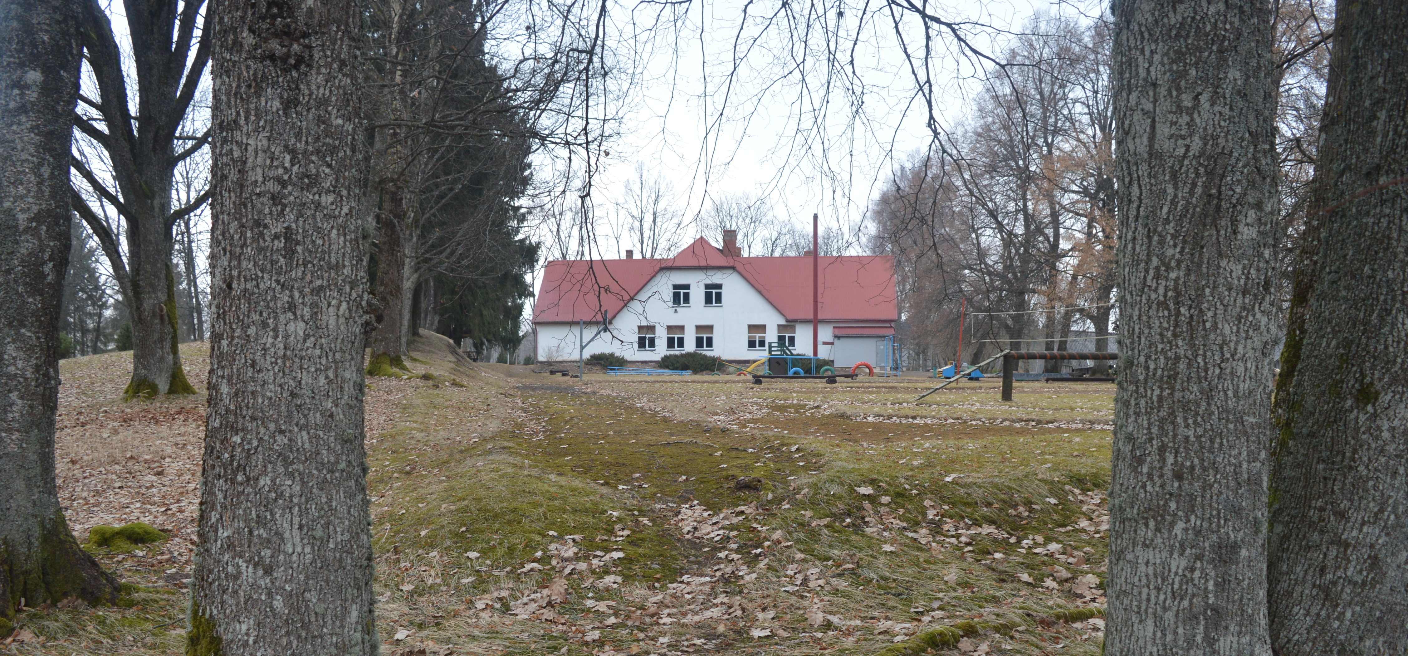 Zaņas skola